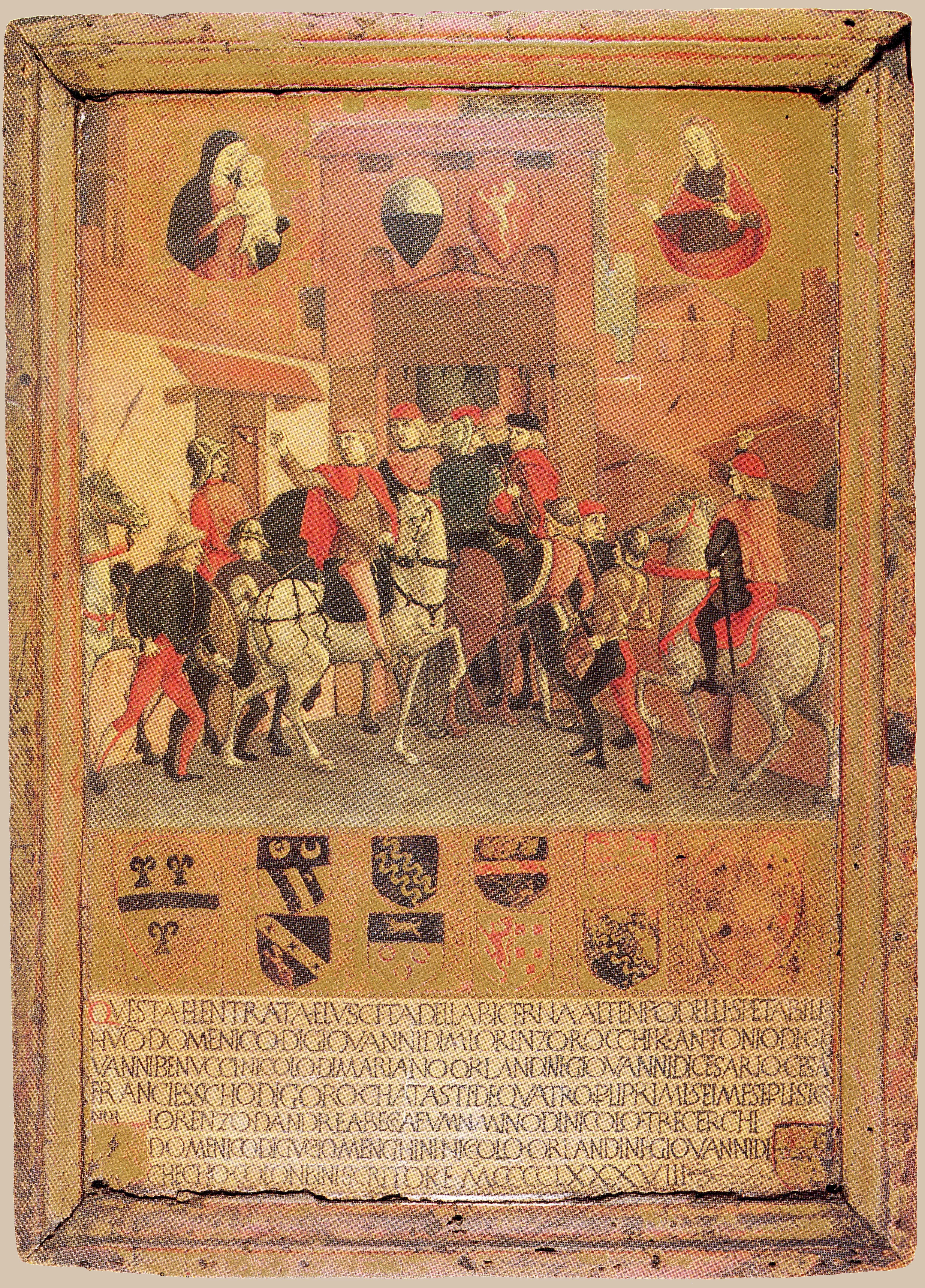 La presa di potere di Pandolfo Petrucci a Siena